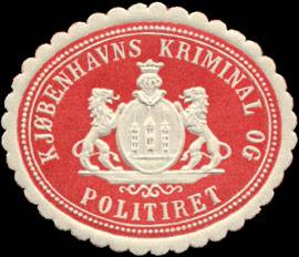 Sealing stamp Title: Kjobenhavns Kriminal og Politiret Description: rot, weiß, geprägt Place: Kopenhagen size: 3x4 cm